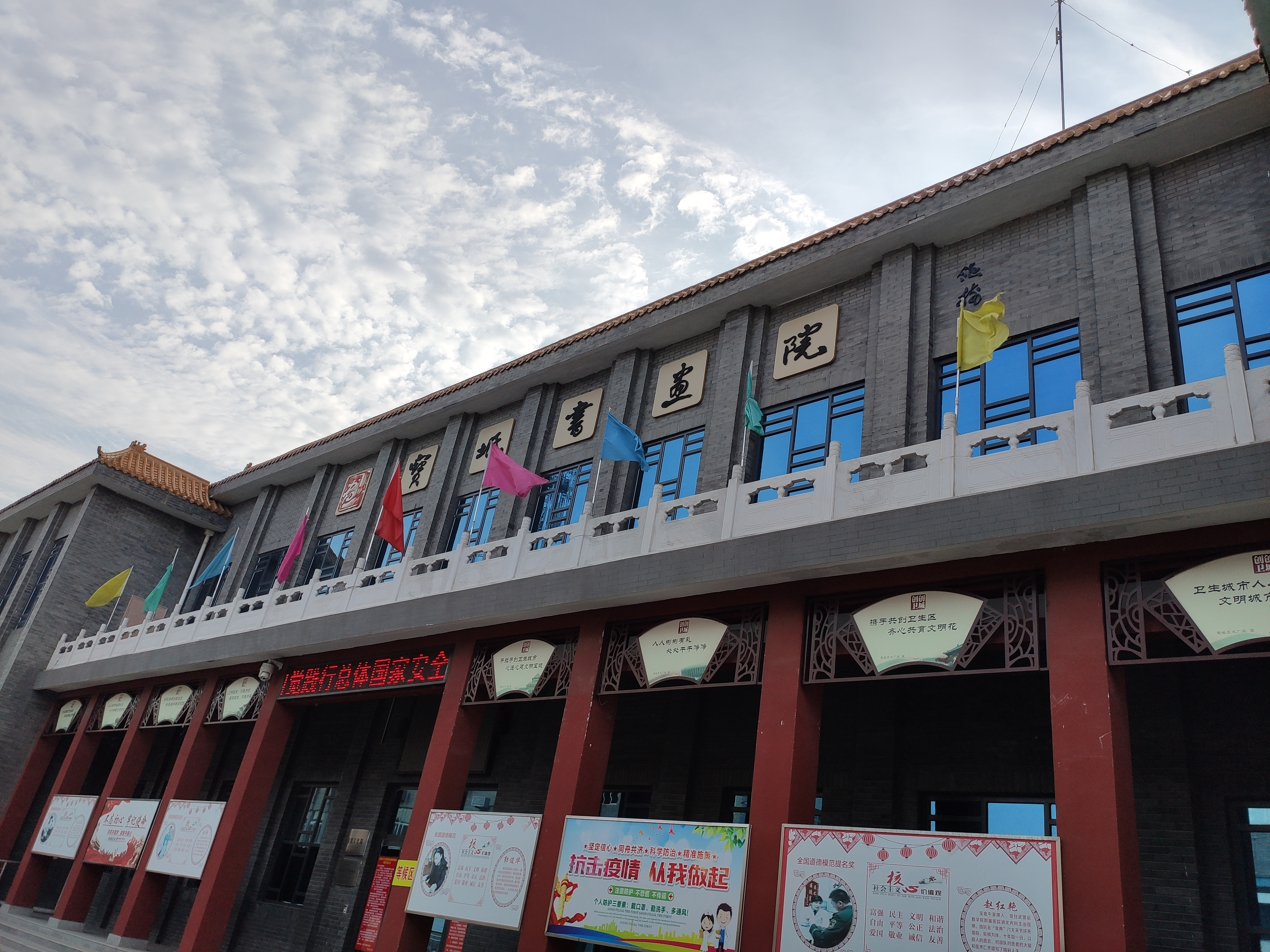 宝坻书画院院址